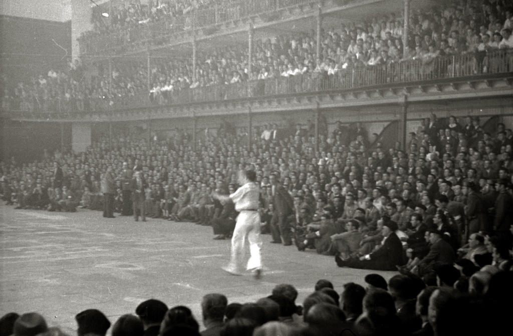 Título original: Partido de pelota en el frontón Astelena de Eibar (1/18) Localización: Éibar (Guipúzcoa)